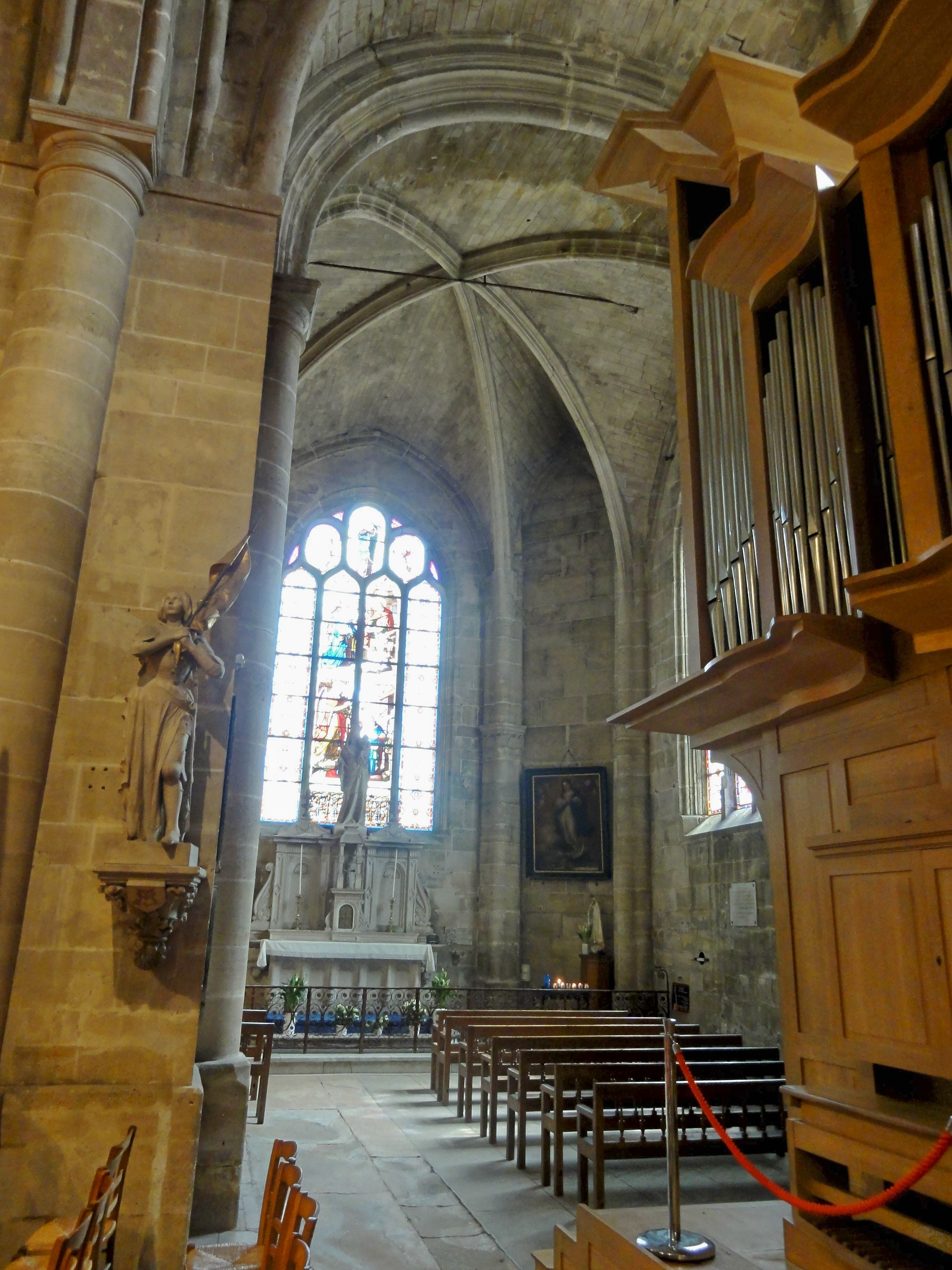 Chapelle latérale sud.